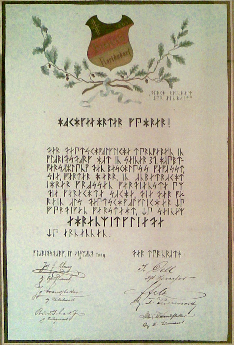 Mitgliedsurkunde des Floridsdorfer Turnvereins für Georg von Schönerer in Runenschrift. Heimatmuseum Zwettl. „Durch Reinheit, zur Einheit.“ Hochgeehrter Führer! Der Deutschvölkliche Turnverein in Floridsdorf hat in seiner 31. Hauptversammlung den Beschluss gefasst, Sie, werter Herr, in anbetracht Ihrer großen Verdienste um die gerechte Sache, die der Verein als Deutschvölklicher zu würdigen versteht, zu seinem Ehrenmitgliede zu ernennen. Floridsdorf, im Eis-Mond [Januar] 2009 [= 1896; die deutschvölkische Bewegung betrachtete die Schlacht von Noreia im Jahre 113 v. Chr. als Beginn ihrer Zeitrechnung], der Turnrath.“ Von den 24 verwendeten Runen haben 14 die Runenzeichen aus dem Codex Runicus als Grundlage. Die restlichen runenähnlichen Zeichen sind von Georg von Schönerer frei erfunden. Schönerers Runenzeichen werden auch im Bismarckturm auf dem Grünberg bei Eger verwendet.